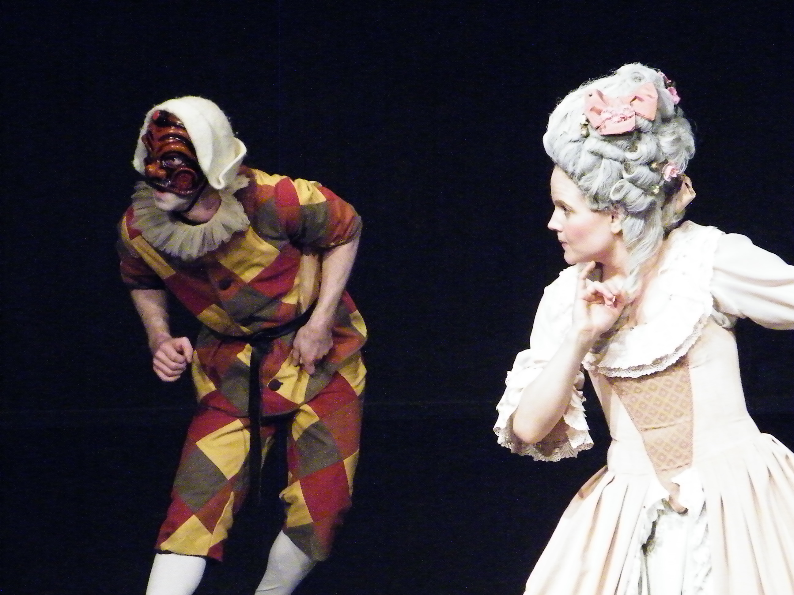 Harlequin (Roar Sørli) och Marie Antoinette (Karolina Ahrenstedt)